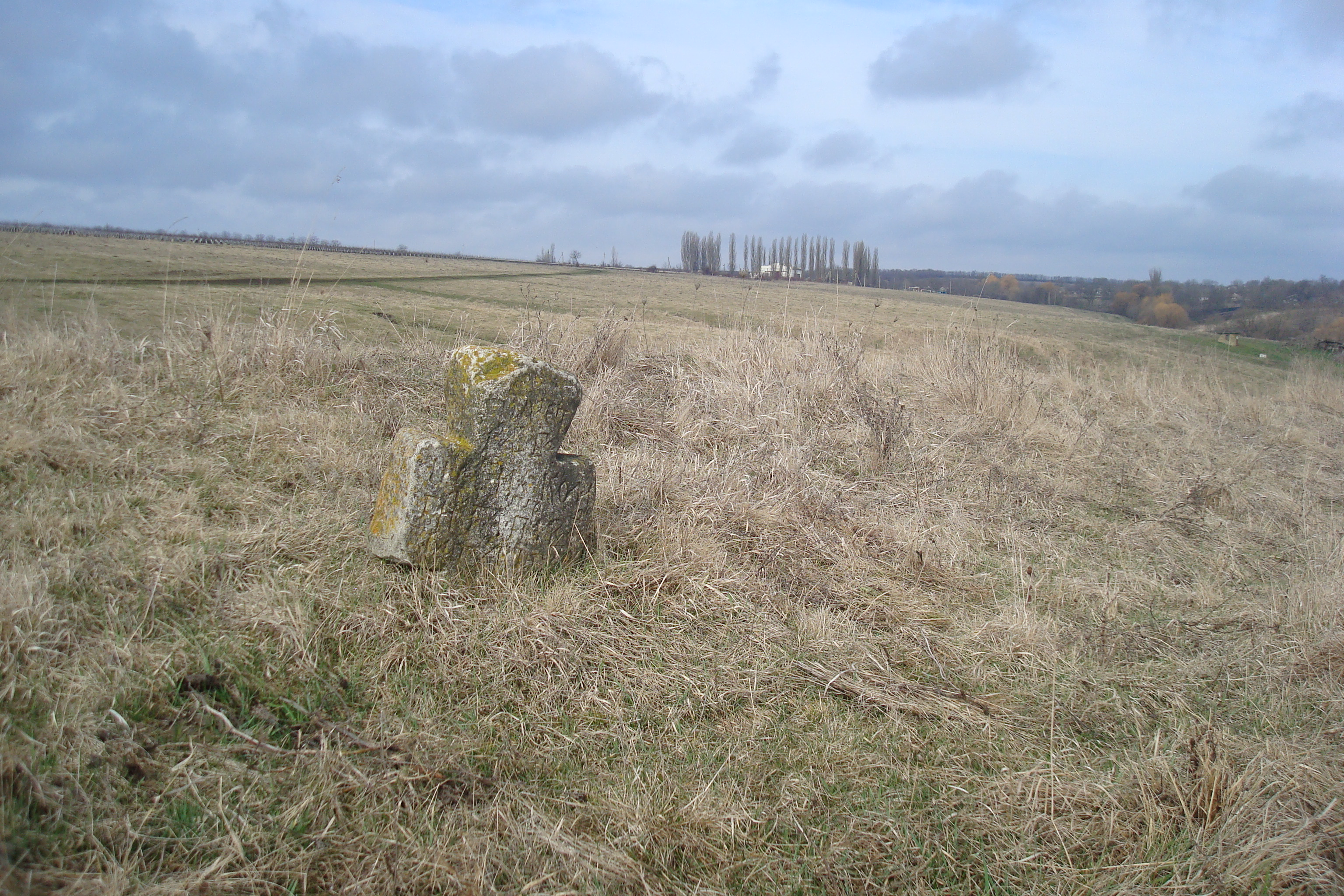 Mormintul victimilor epidemiei de ciuma 1819